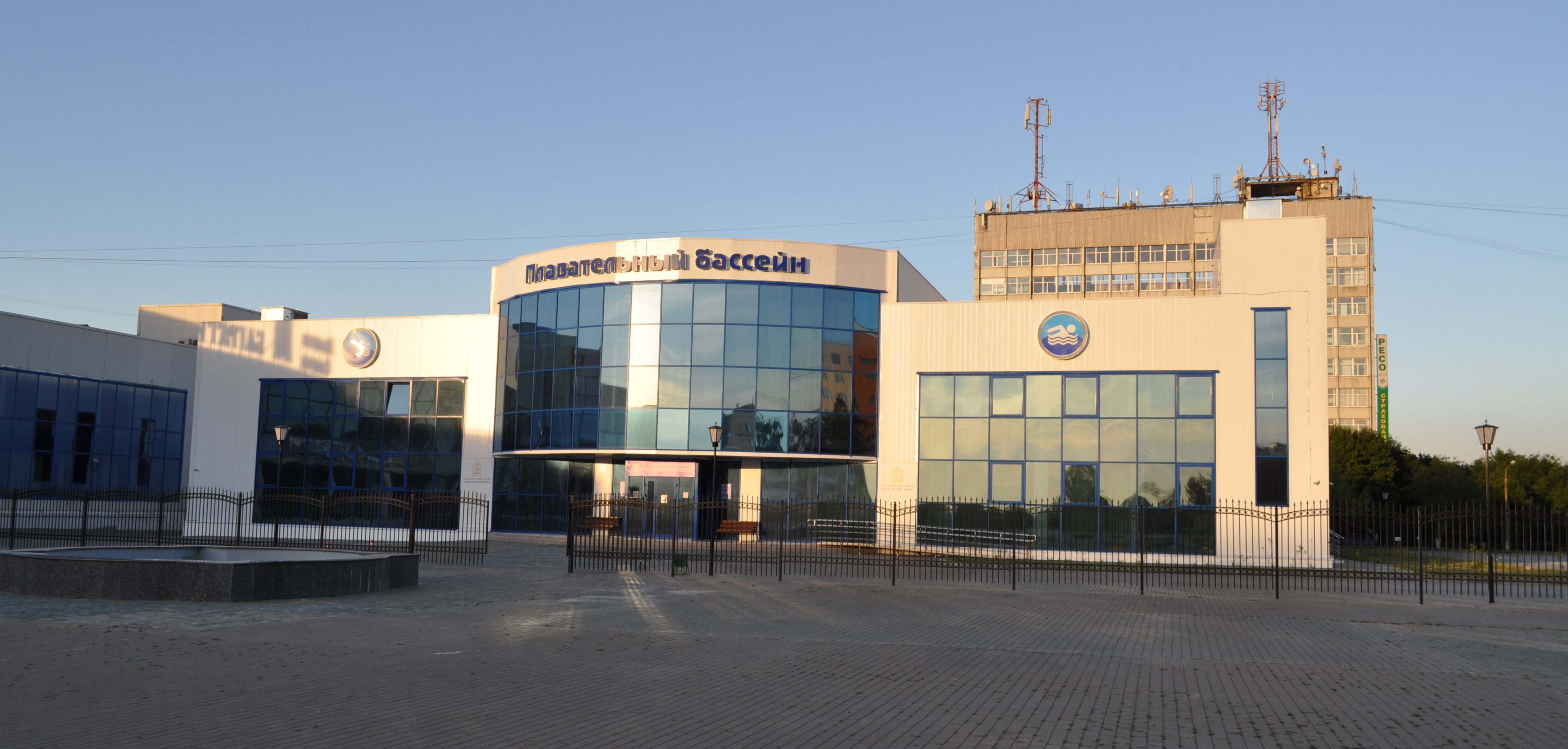 Можайский районный плавательный центр